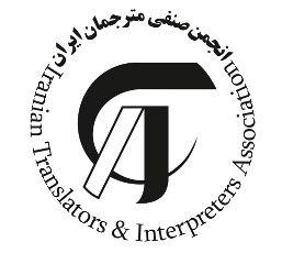 انجمن صنفي مترجمان ايران